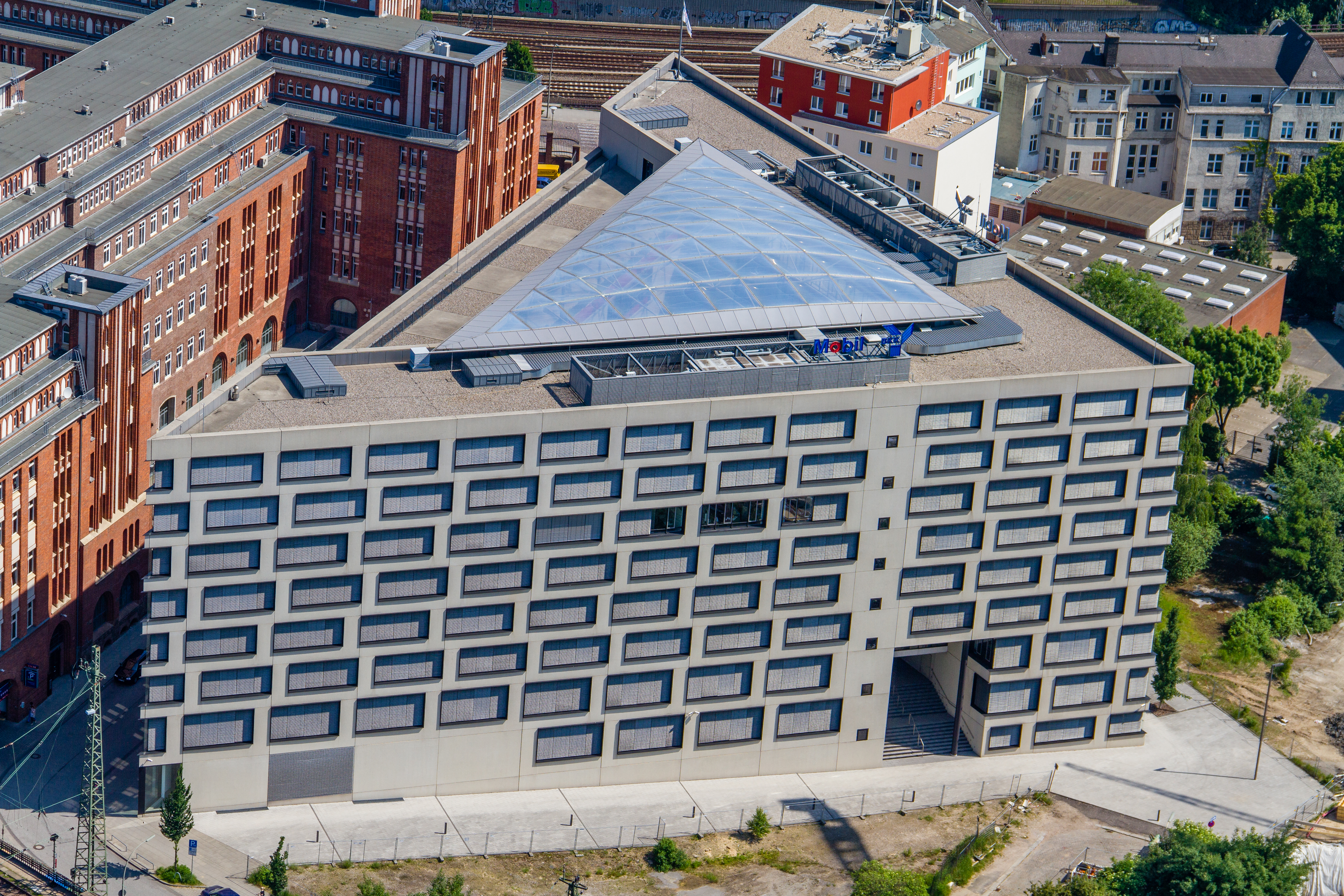 Betriebskrankenkasse Mobil Oil Hamburg, Hühnerposten 2, 20097 Hamburg